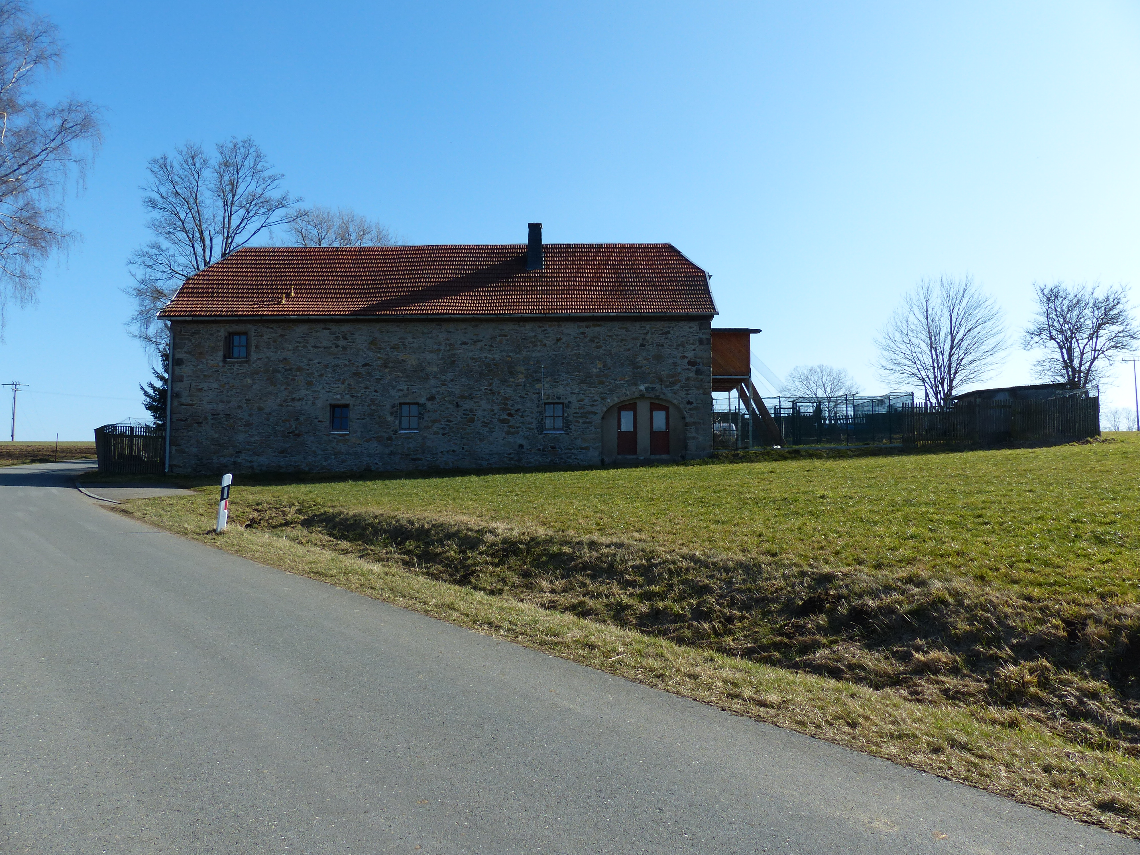 Eingemeindungen im Südwesten des Hauptortes Oberkotzau